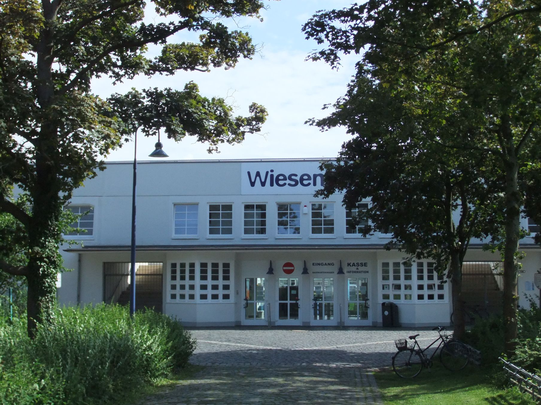 Wiesenbad. Denkmalgeschütztes Freibad in Bielefeld.